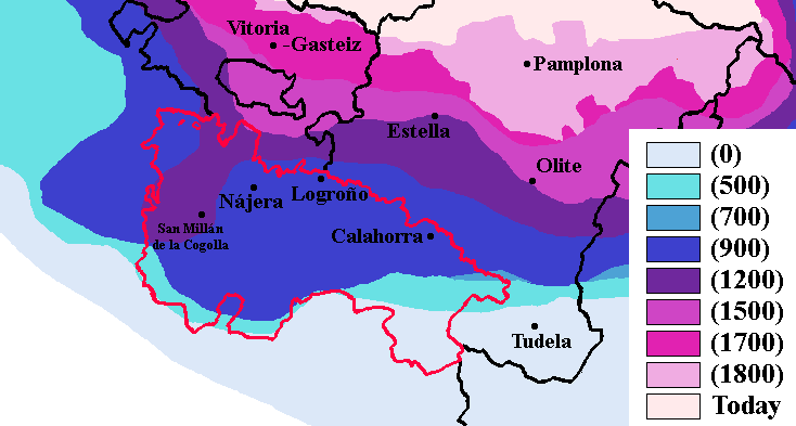 Carte montrant la langue basque dans La Rioja au cours de l'histoire